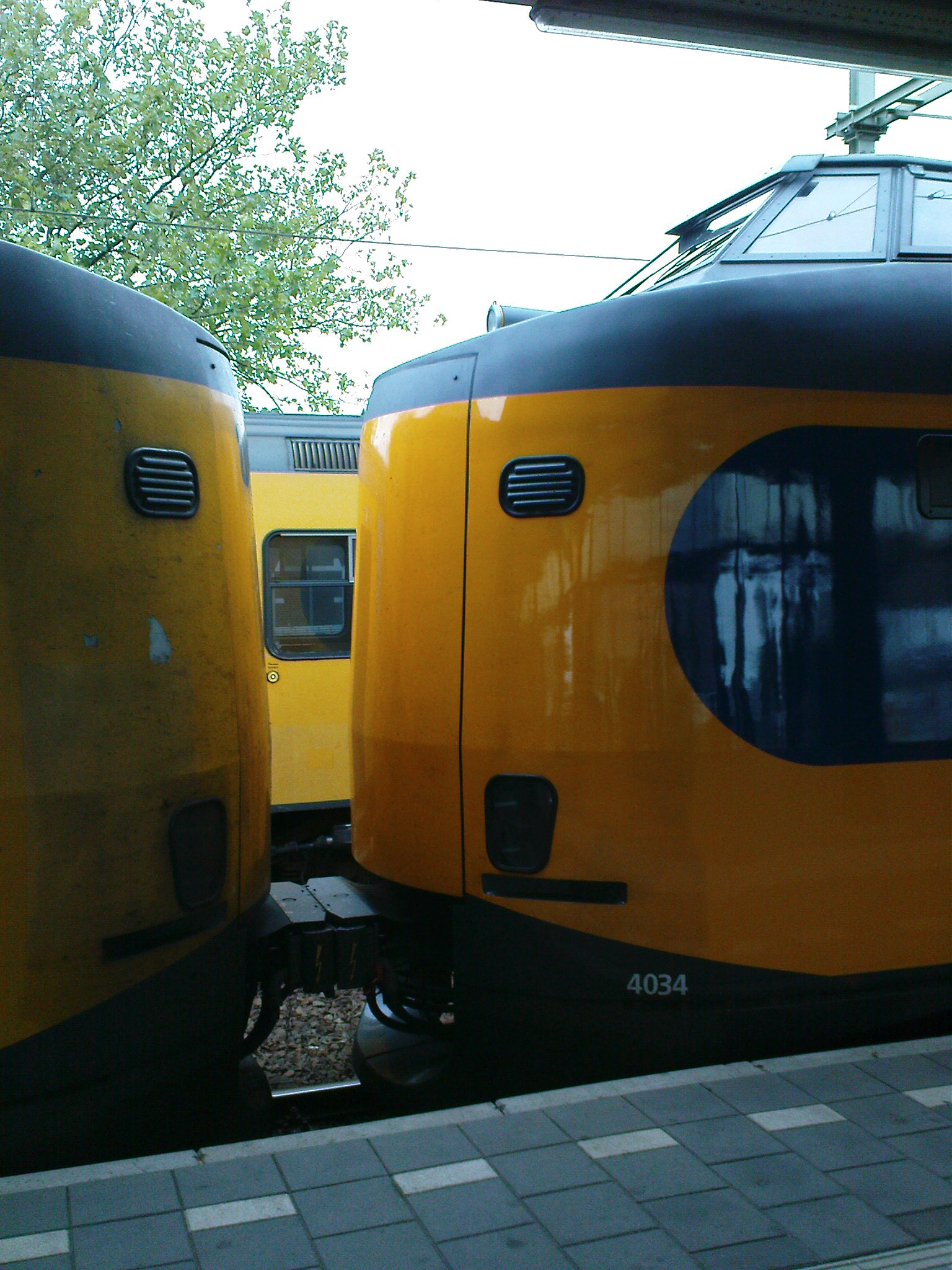 Twee koplopers van NSR te Almelo centraal, de linker in oude staat en de 4034 in vernieuwde.